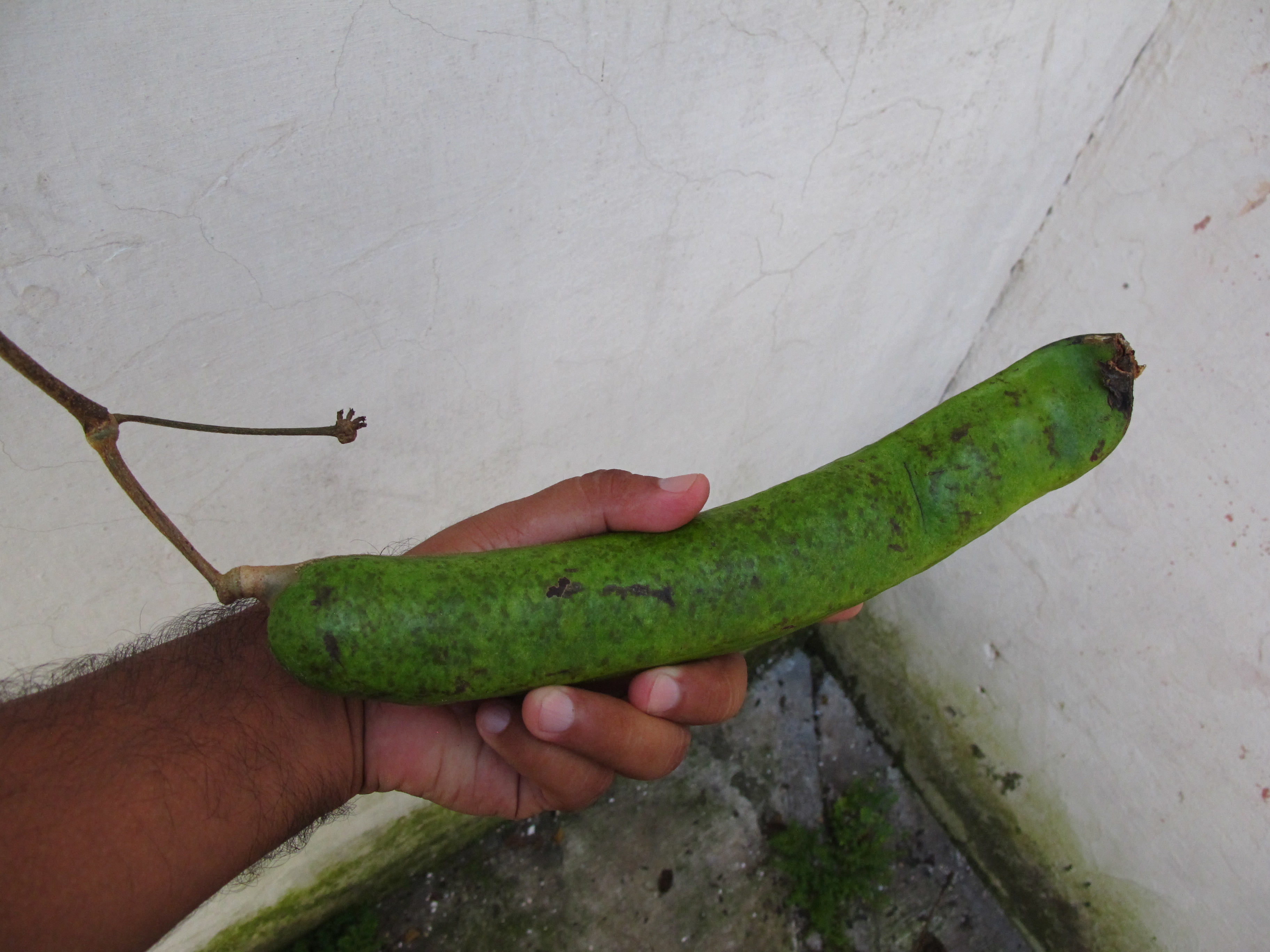 foto de toda la vaina